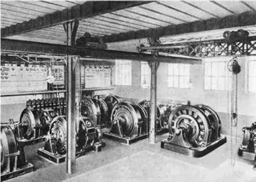 Maschinensaal des ehemaligen Kraftwerks in Mailand an der Via Santa Radegonda. Es sind die später installierten Umformergruppen zu sehen